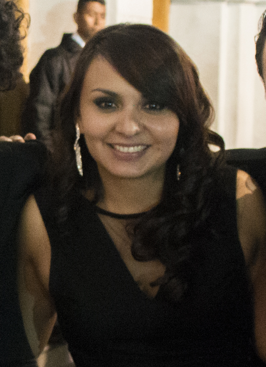 Extracto de una fotografía grupal de Enchufe.tv